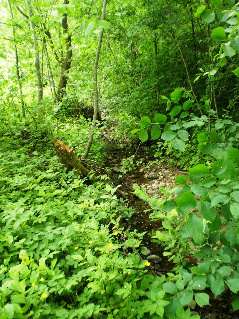 Šušvės intakas Žiedupė šalia Plinkaigalio piliakalnio, Kėdainių raj.